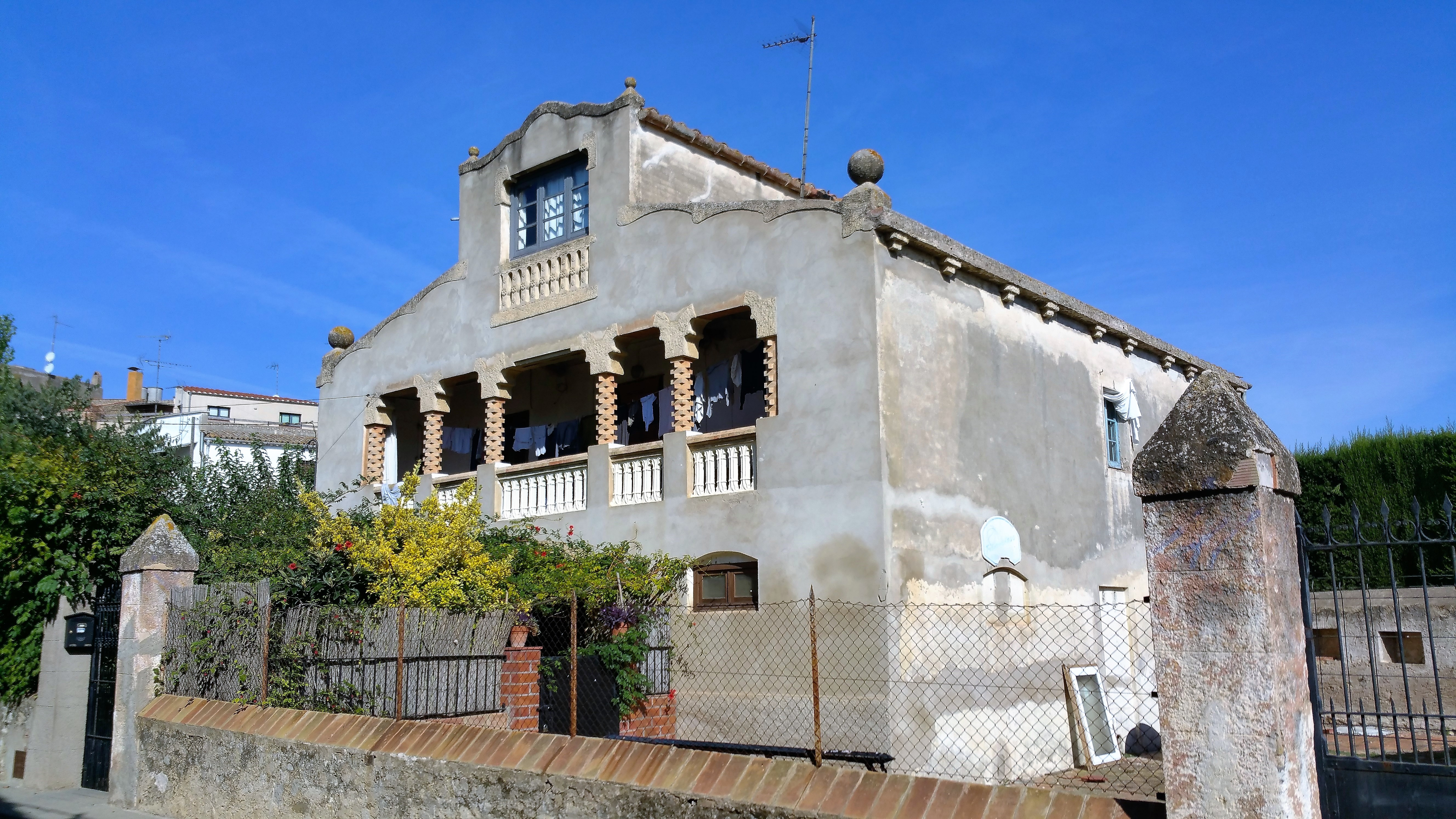 Casa al carrer Empordà (Saus, Camallera i Llampaies)